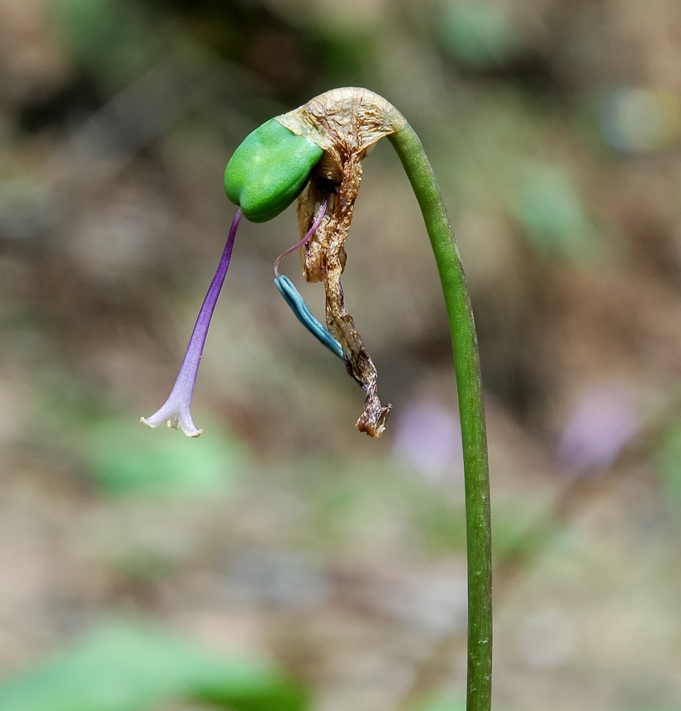 Erythronium japonicum (Katakuri, カタクリ)